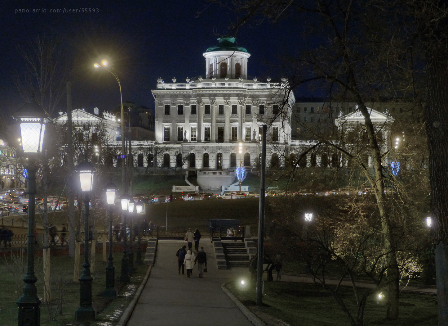 Кадр сделан вечером 1 января 2014 года. Постоянного снежного покрова в городе не было.